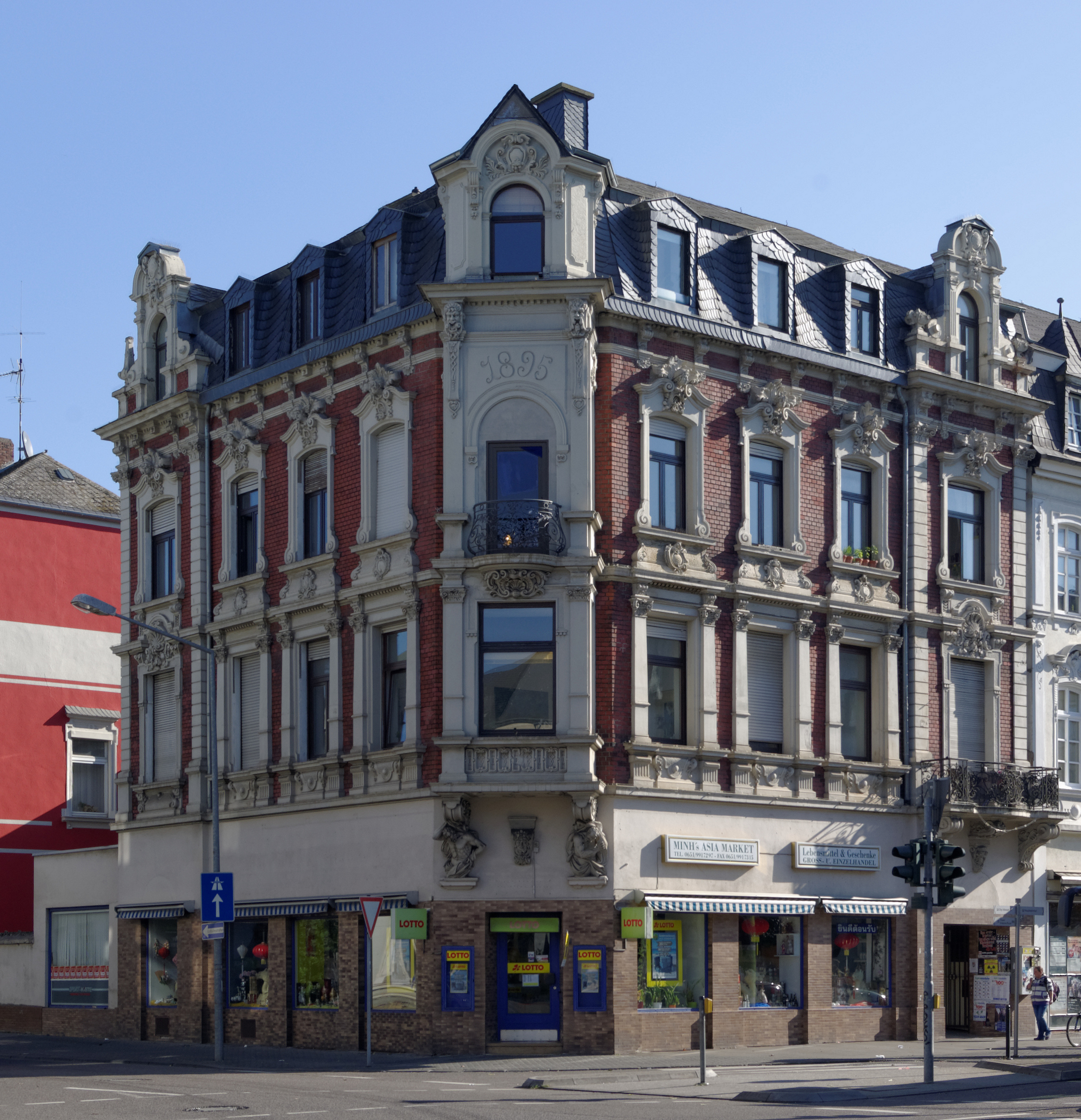 Trier, Bahnhofstraße 23: dreigeschossiges neubarockes Eckwohn- und Geschäftshaus, sandsteingegliederter Klinkerbau, 1894